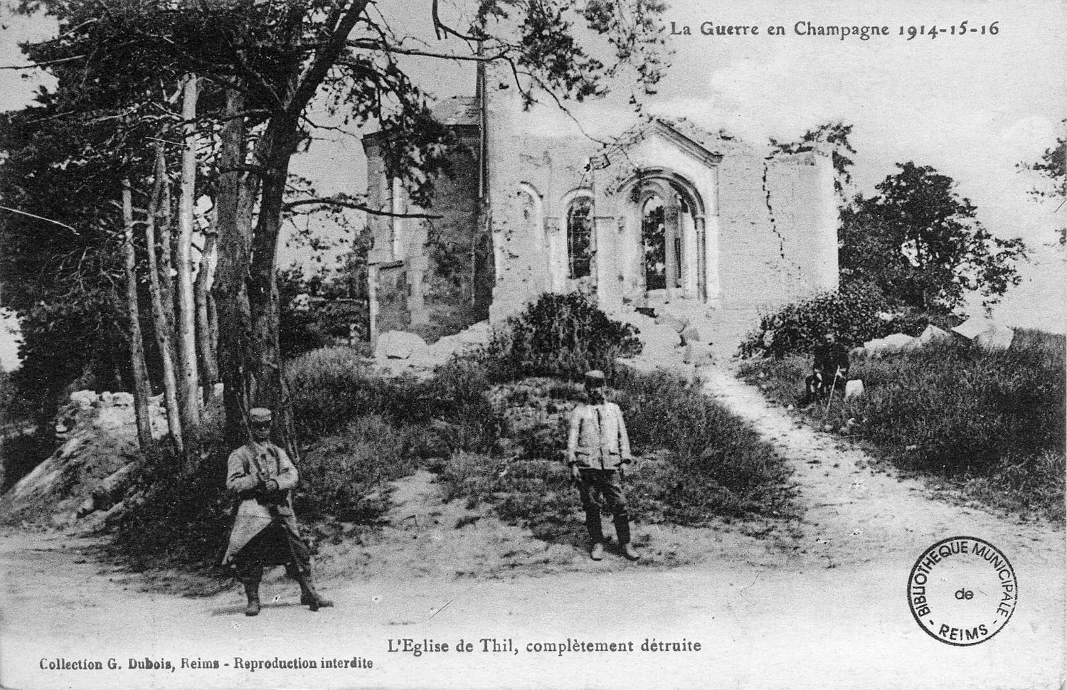 sur une vue ancienne.